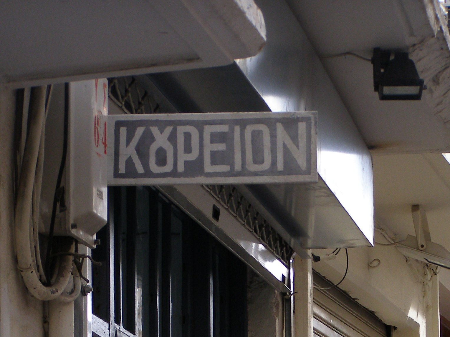 Aushängeschild eines griechische Barbiers (ΚΟΥΡΕΙΟΝ) mit OY-Ligatur ( Ʊ )